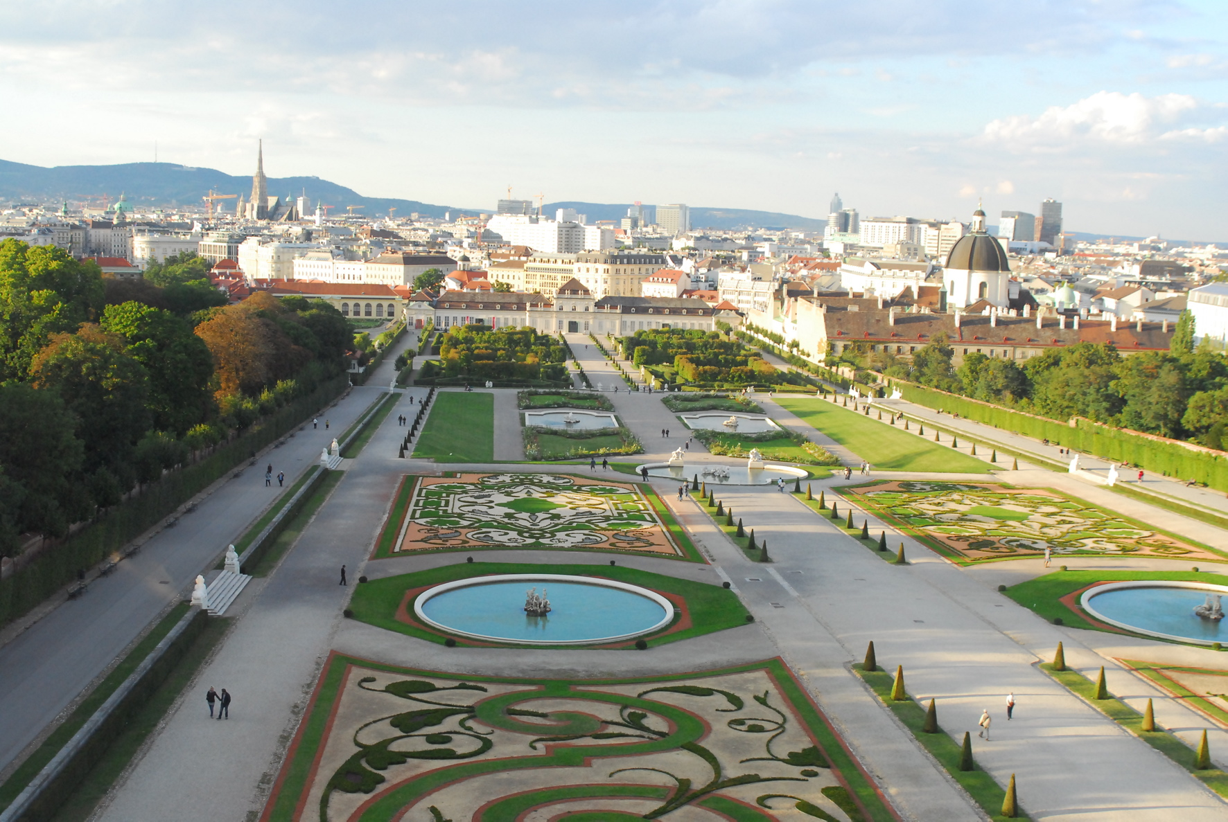 Blick vom Oberen Belvedere auf den nördlichen Teil des Schlossgartens.